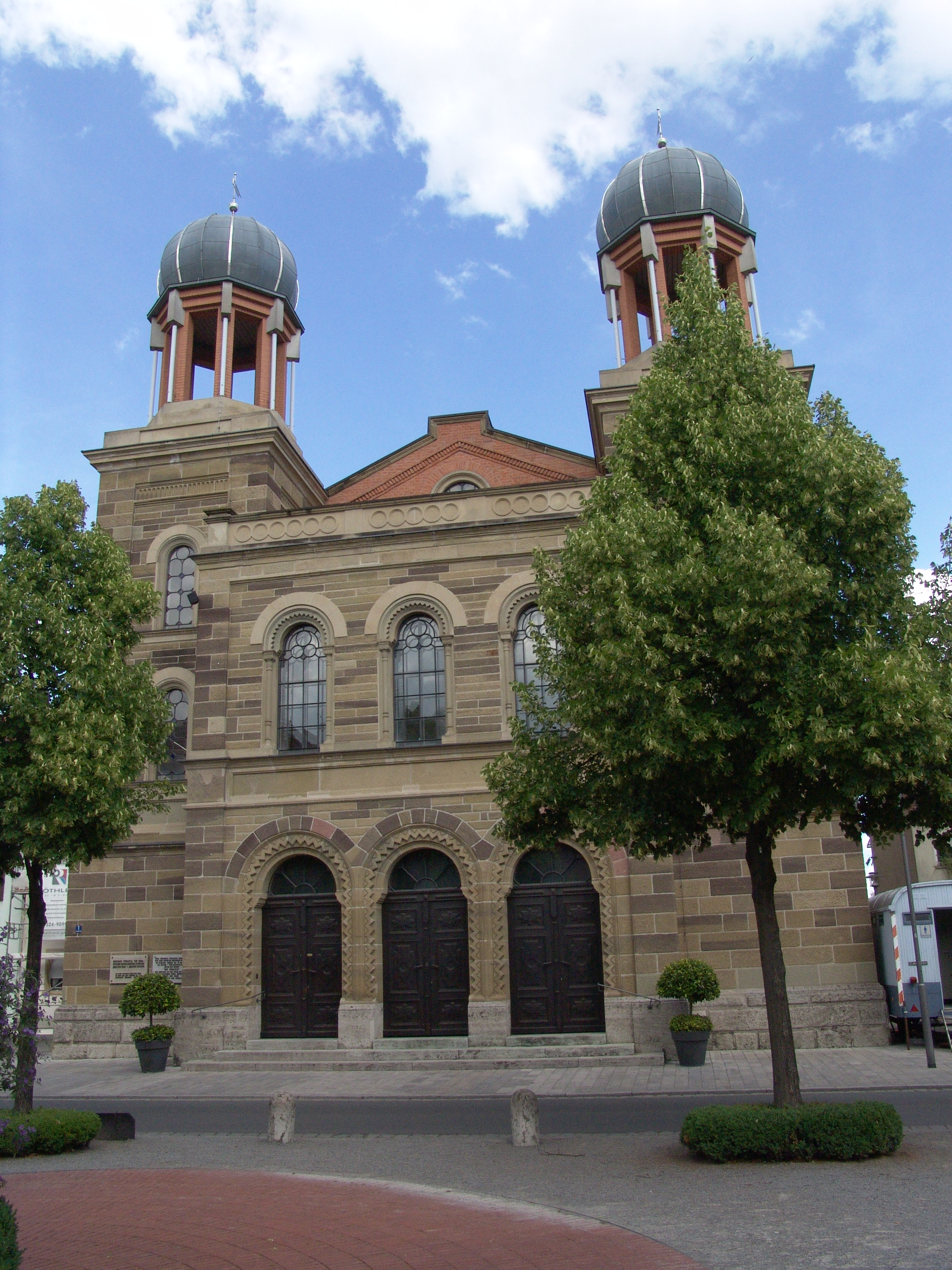 Kitzingen Ehem. Synagoge